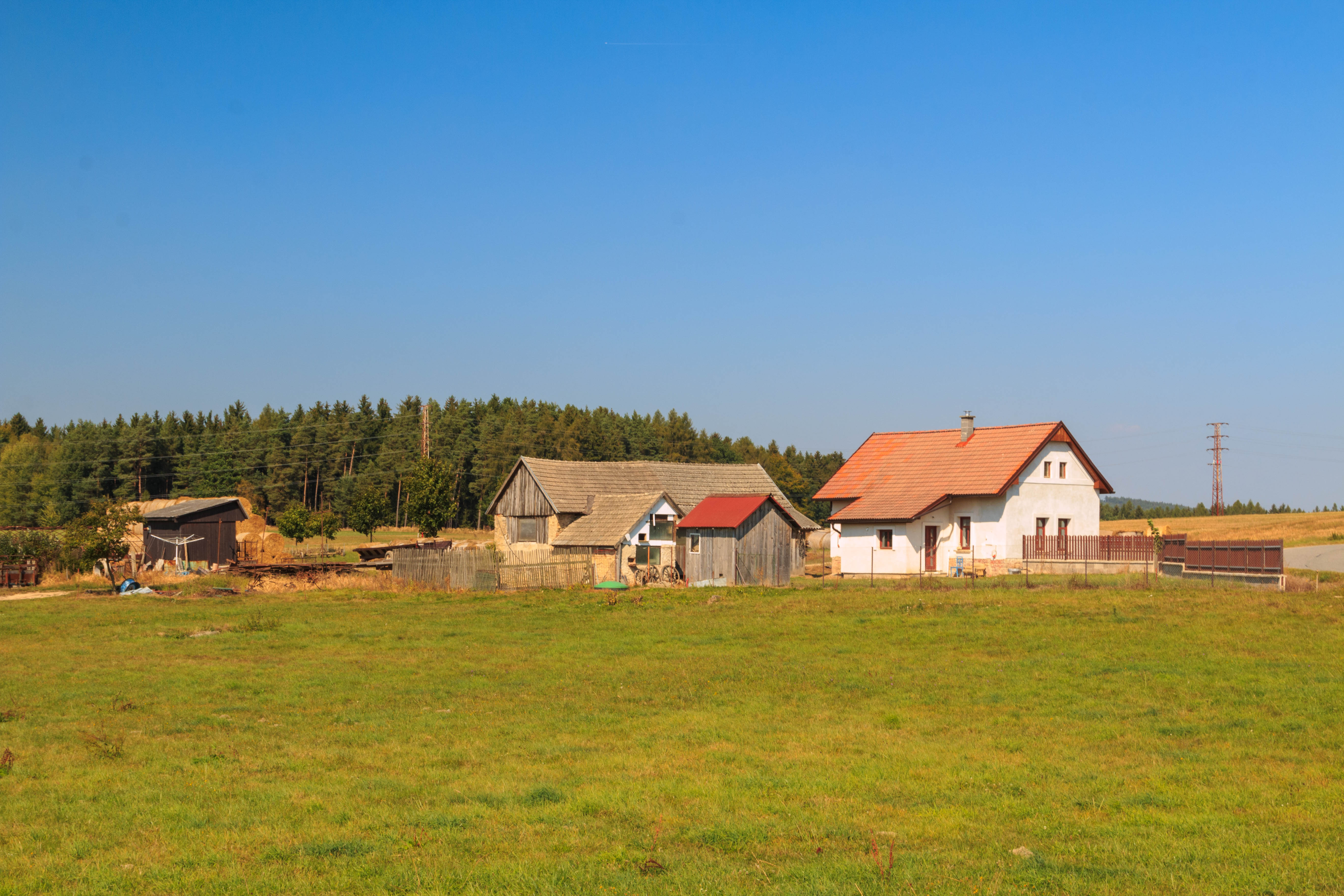 Smrčensko - čp. 21